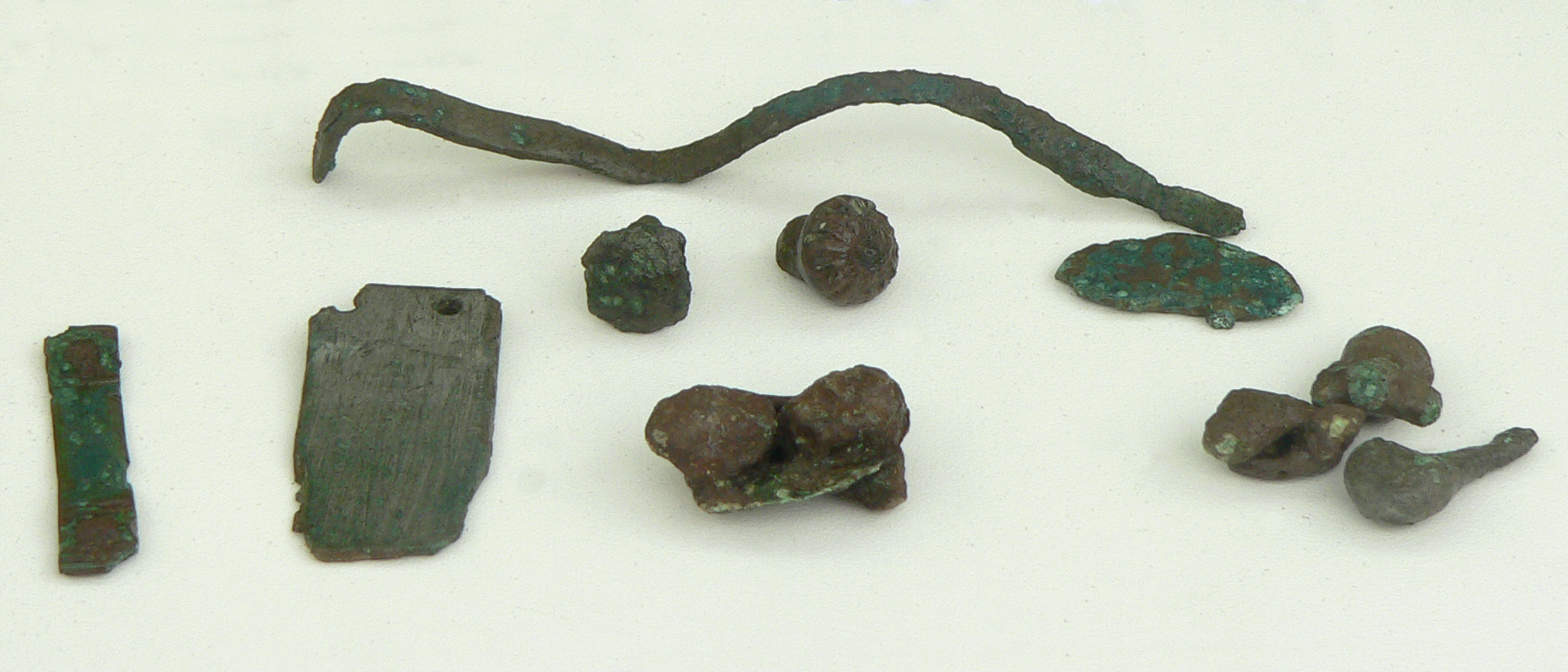 Eisen- und kaiserzeitliche Siedlung bei Lemke, Fundstücke aus Bronze, Riemenzunge, Gürtelbeschlag, Zierschlüssel, Nieten, Zierknöpfe, verschmolzene Gegenstände.